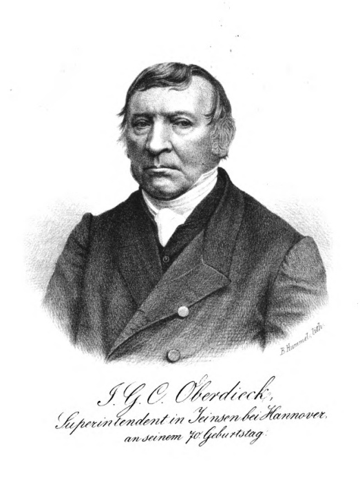 J. G. C. Oberdieck, Superintendent in Jeinsen bei Hannover, an seinem 70. Geburtstag.